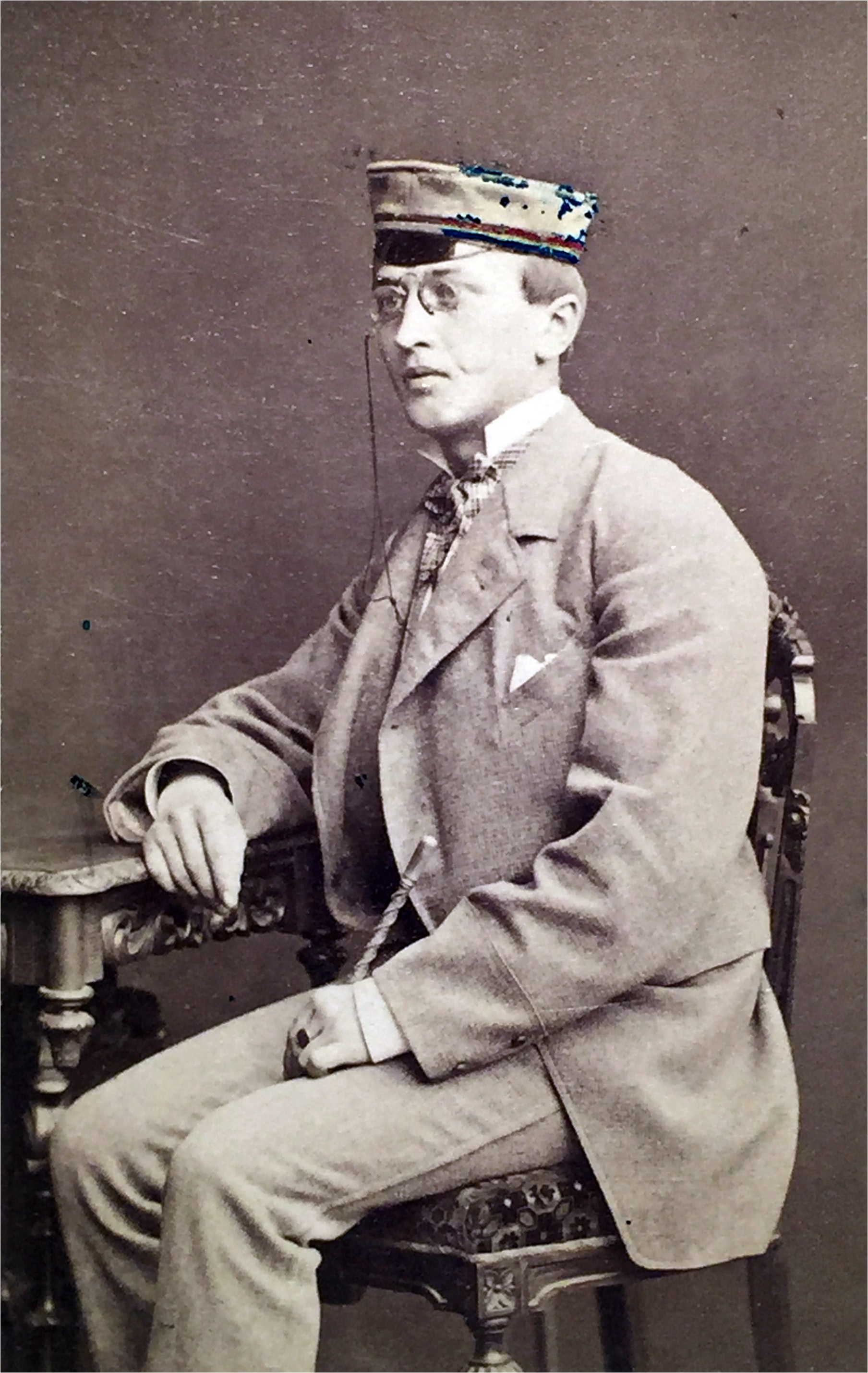 Max Küstner als Angehöriger des Corps Lusatia Leipzig